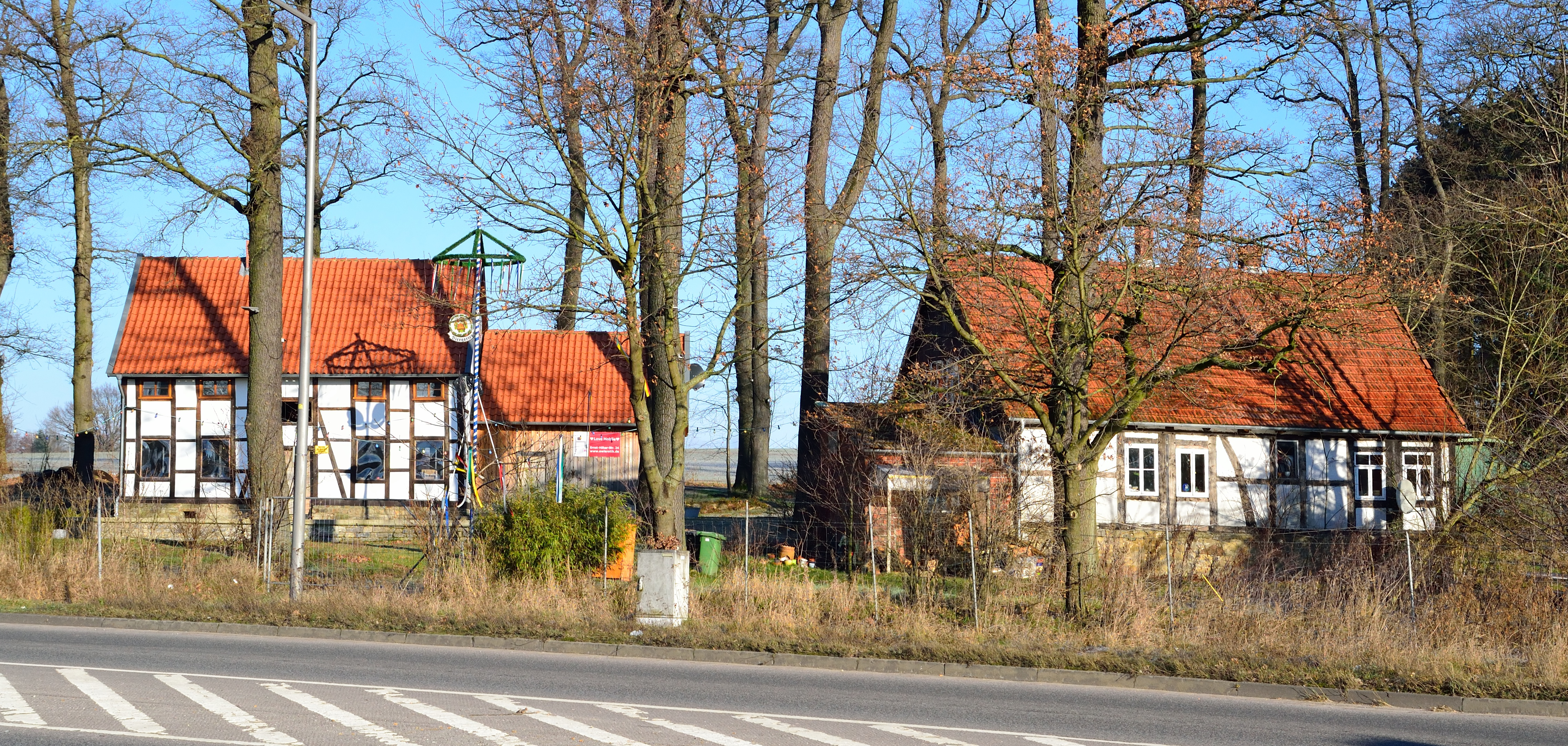 This is a photograph of an architectural monument. Gut Herberhausen, Objekt 7: 2 Arbeiterhäuser in der Nordwestecke des Herberhauser Waldes